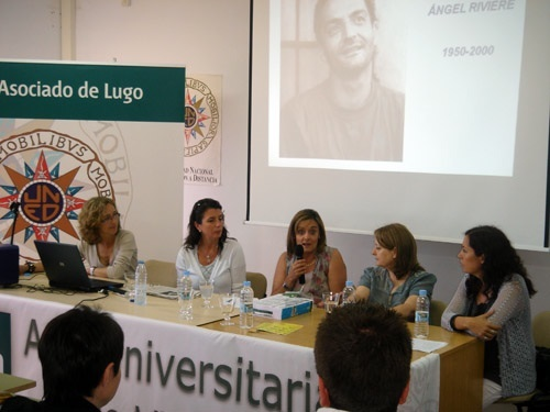 UNED